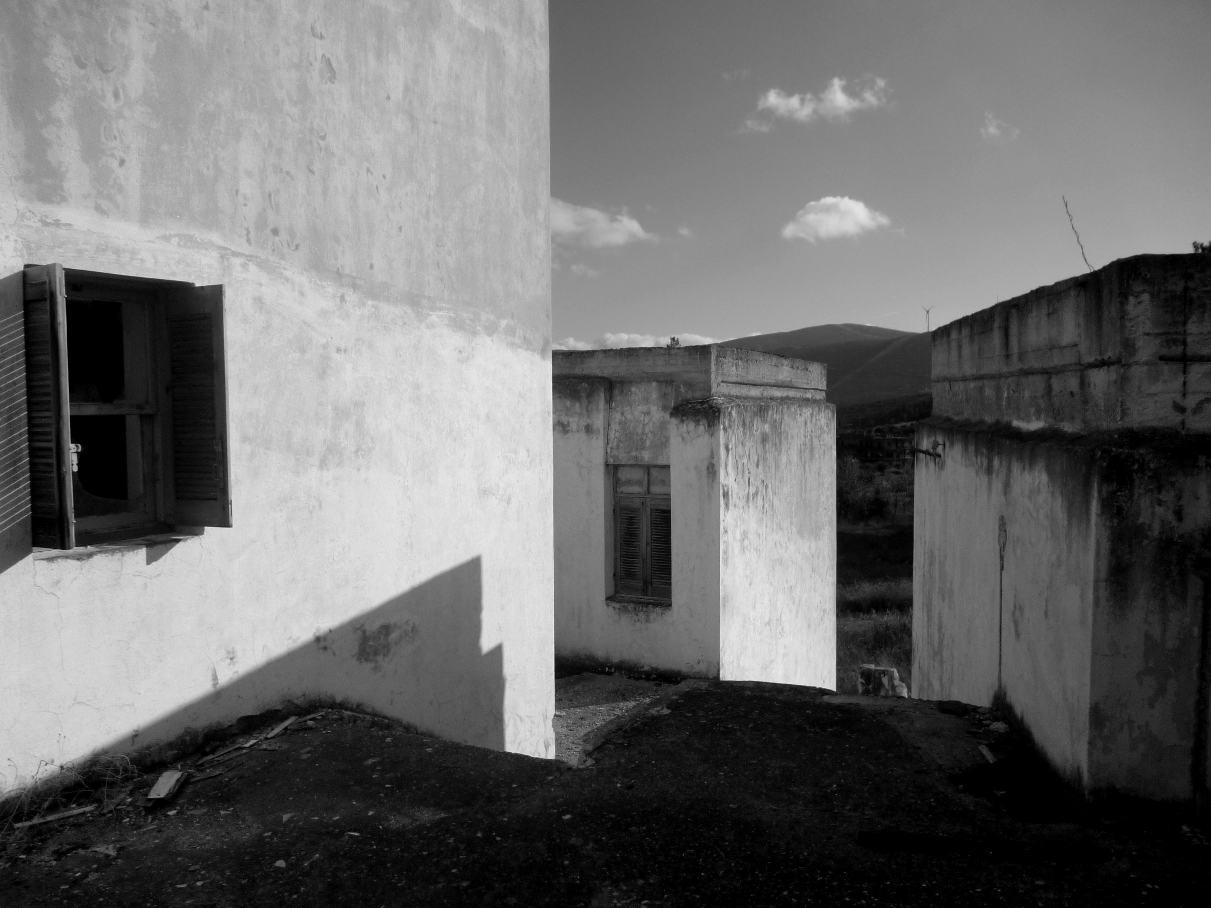 οικισμός Μπάρλου στο Δίστομο